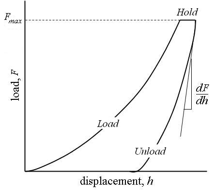 Load-displacement curve via nanoindentation